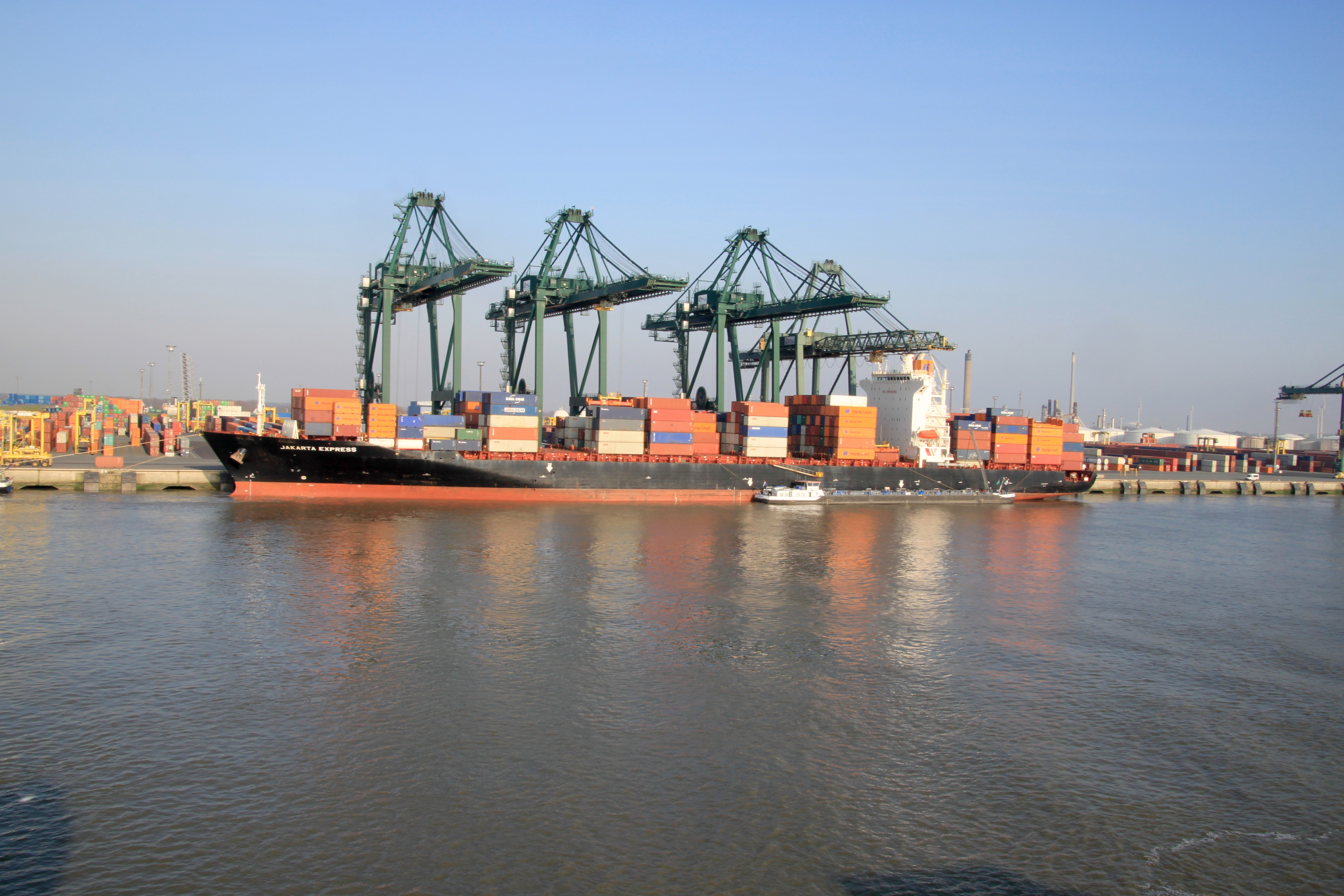 JAKARTA EXPRESS am PSA Terminal in Antwerpen